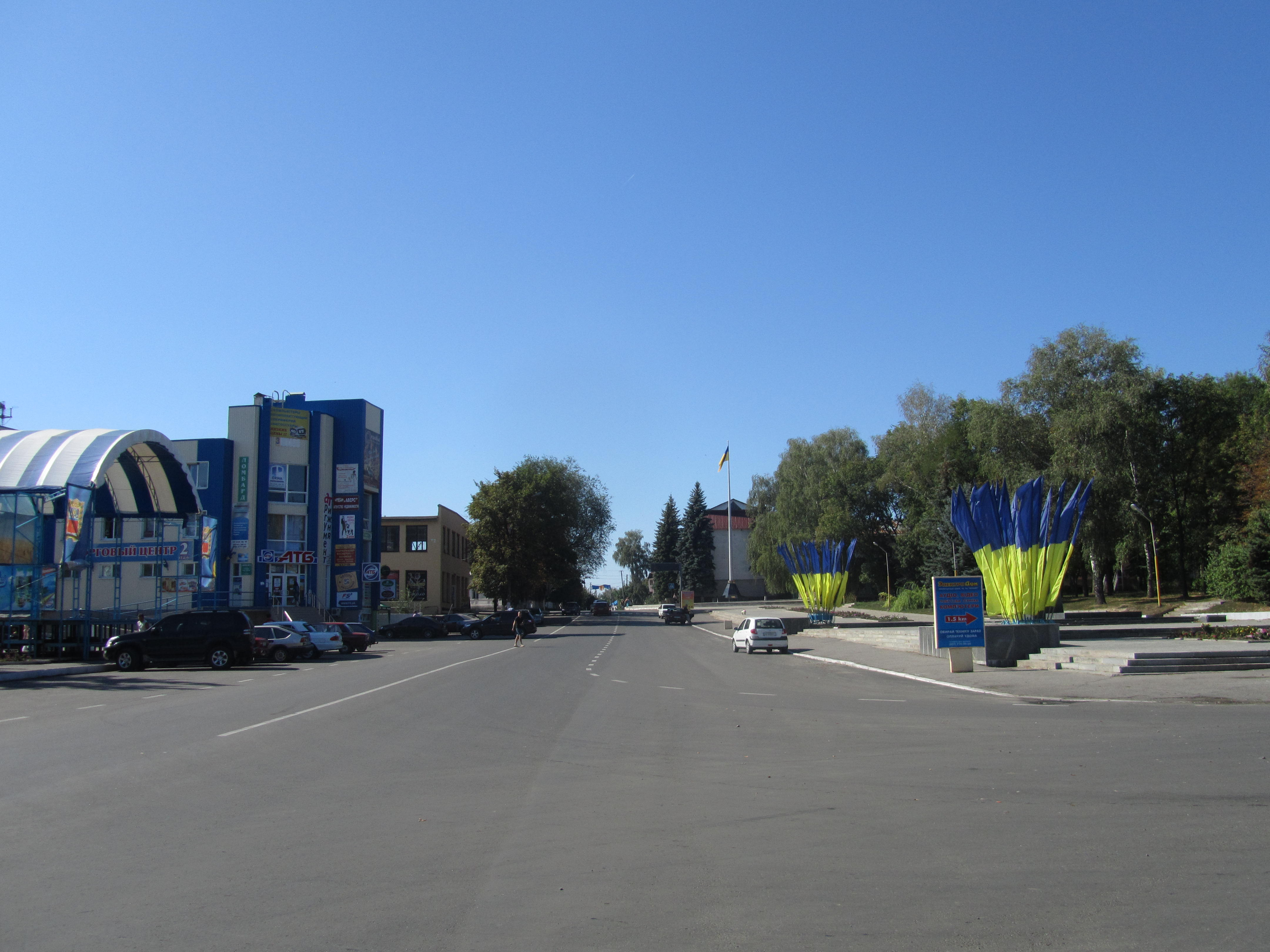 Зміїв - у центрі